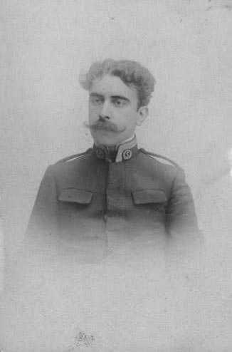 Tenente médico Dr. Júlio Dantas (Colégio Militar: 114/1887) Fotografia, c. 1900. Cota: pasta 29, A IV. 432 – 23200 Arquivo Histórico Militar de Lisboa.